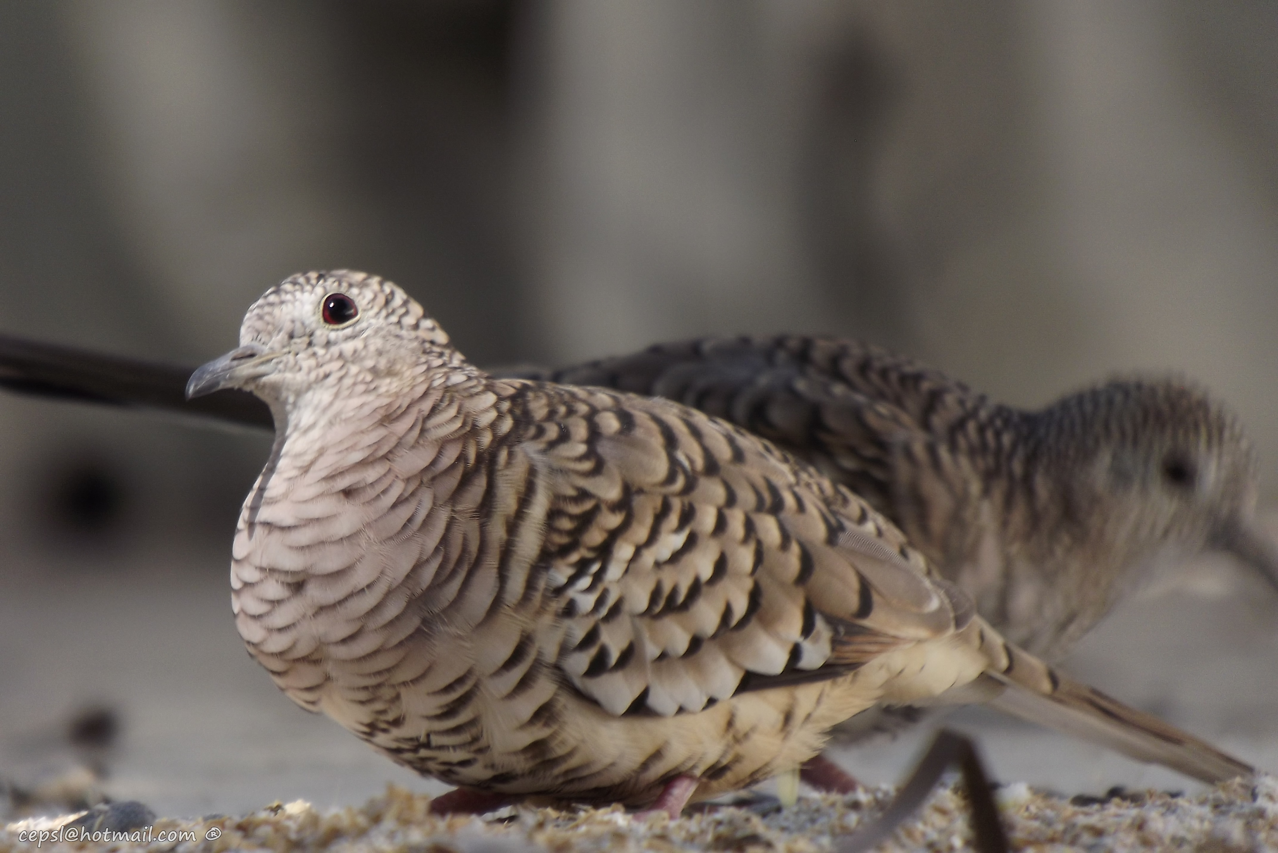 Paloma maraquita, ampliamente distribuida por toda Sur América, desde Argentina hasta Venezuela